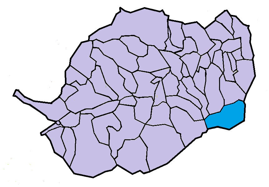 Vallmanya en el Conflent, a partir del mapa municipal del Conflent de lliure disposició adaptat al Nomenclàtor toponímic aprovat el 2007